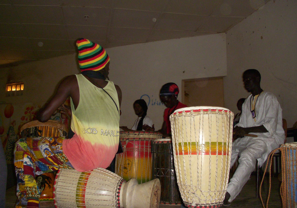 Musiciens à Dakar, Sénégal